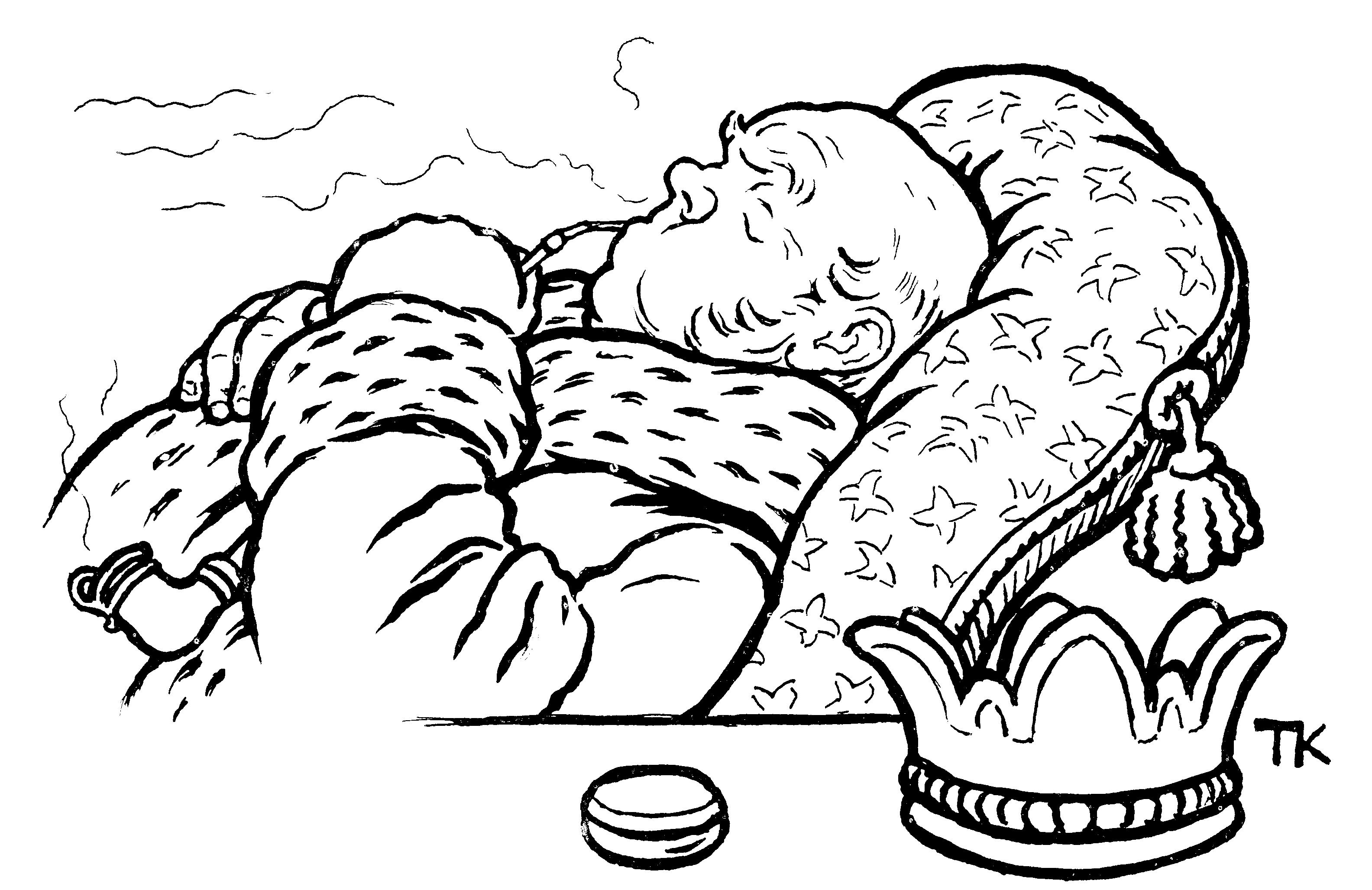 Illustrasjon til folkeeventyret Askeladden og de gode hjelperne «Det var en gang en konge, og den kongen hadde hørt tale om et skib som gikk like fort til lands som til vanns; så vilde også han ha et slikt et, og til den som kunne bygge det, lovte han ut kongsdatteren og halve kongeriket, og det lyste han op på kirkebakkene hele landet over» Scanned illustration from 1936 edition of Asbjørnsen & Moe: Samlede eventyr. Norske kunstneres billedutgave. Gyldendal Norsk forlag.